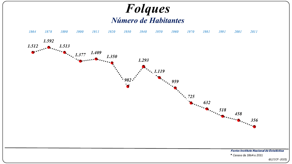 População